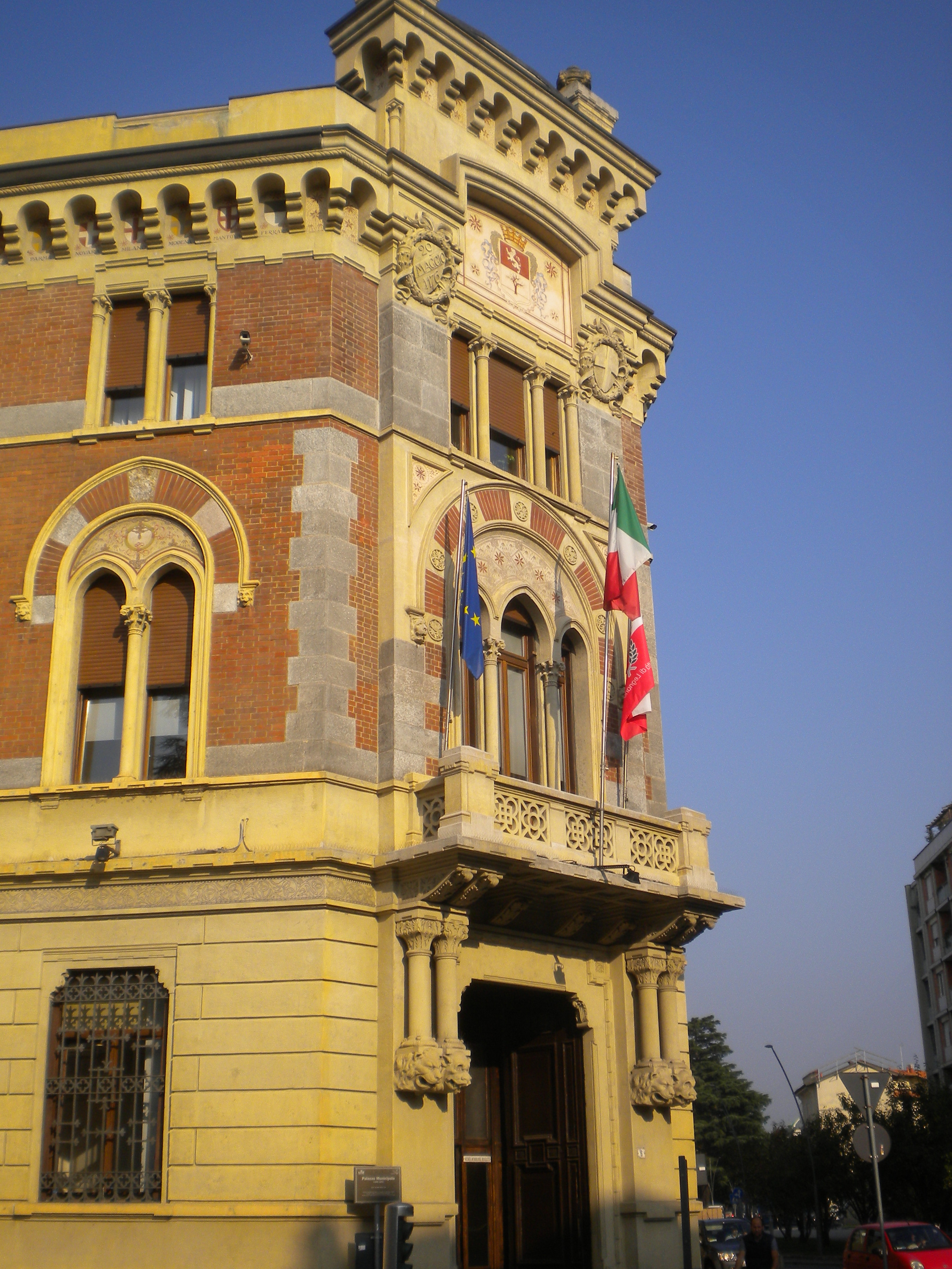 Palazzo Malinverni This is a photo of a monument which is part of cultural heritage of Italy.